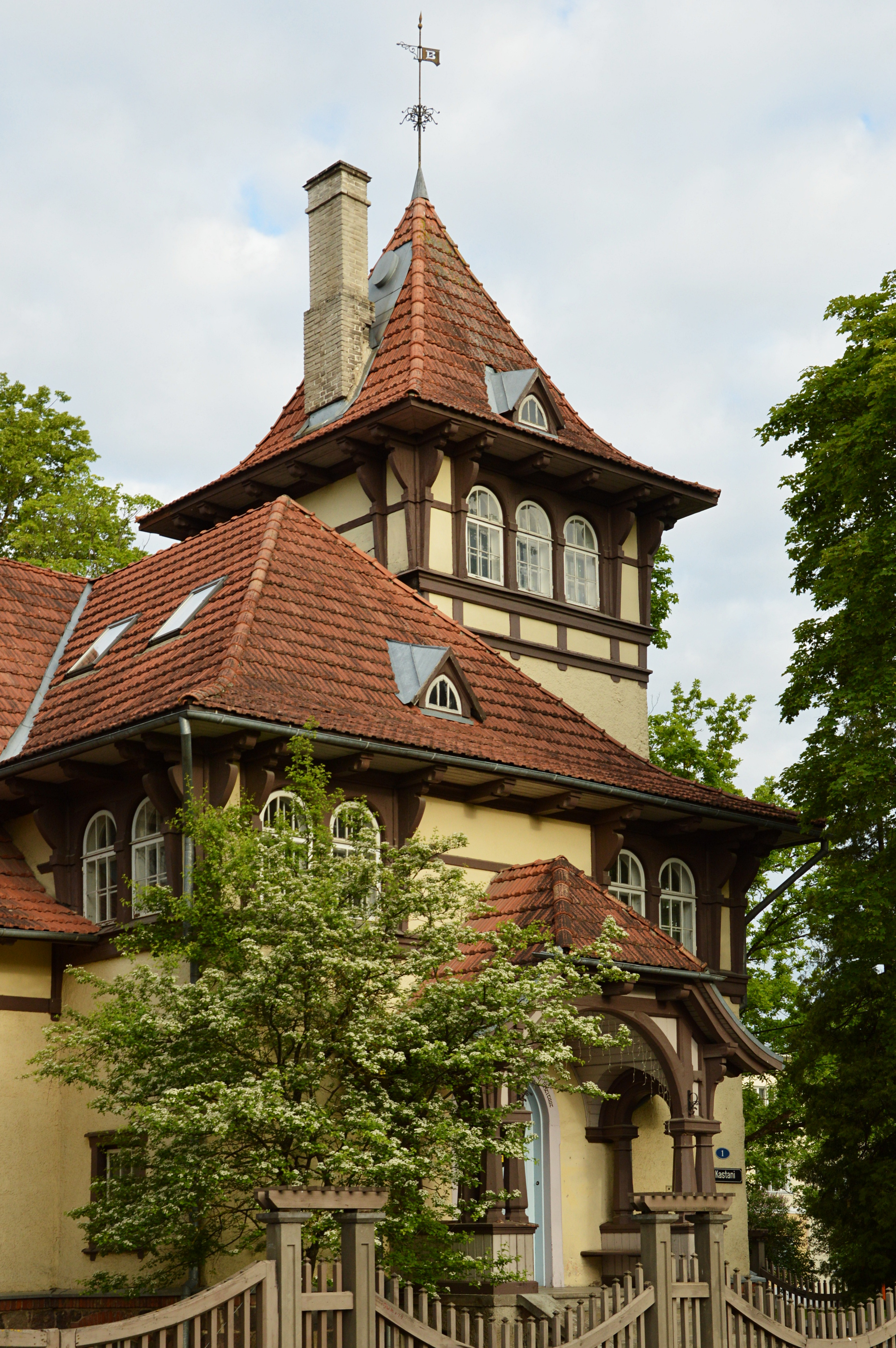 Tartu Saksa Kultuuri Instituut